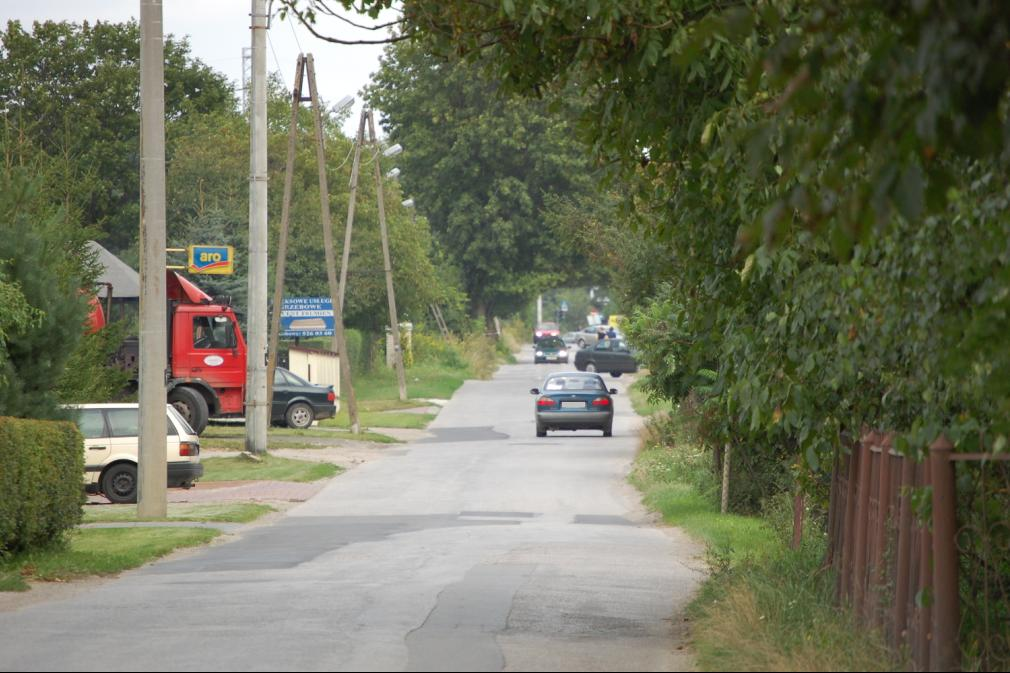 Ulica Raszyńska w Lublinie